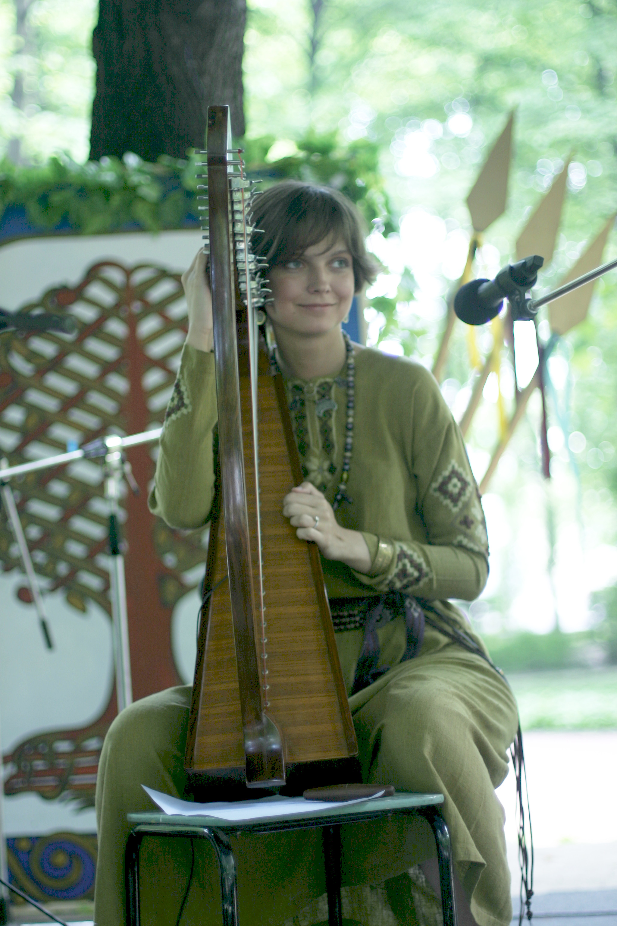 Хелависа (Наталья Андреевна O'Шей). Фотографии от 26.06.2004, фестиваль, приуроченный к 300-летию Летнего сада.